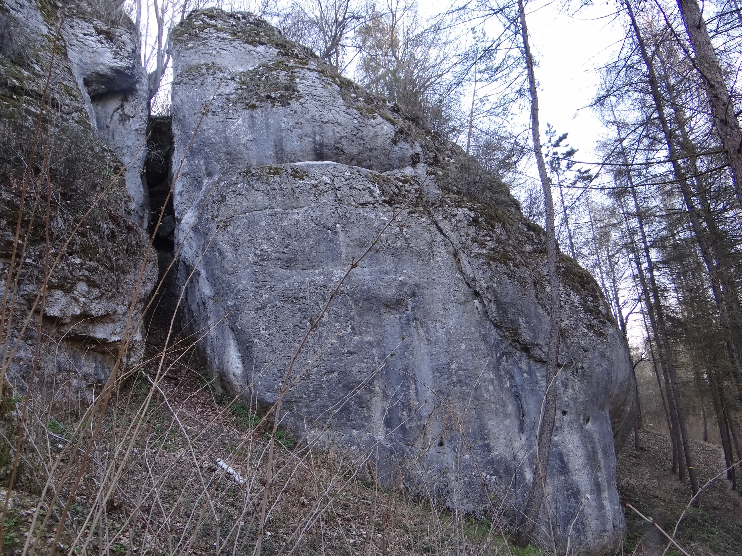 Skała Obchodnia w Dolinie Brzoskwinki